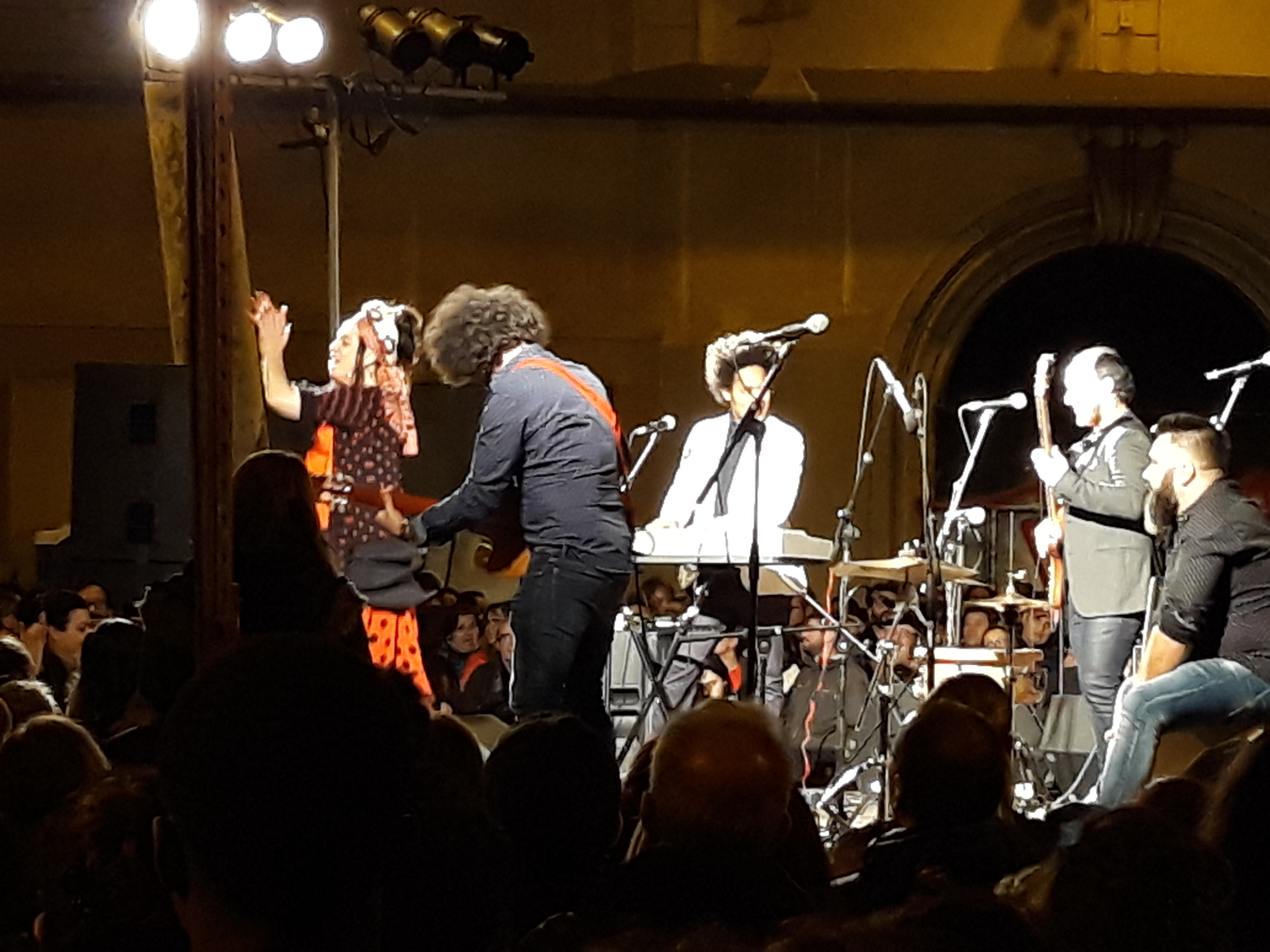 Festival de Rumba all Raval, 29 gen 2018